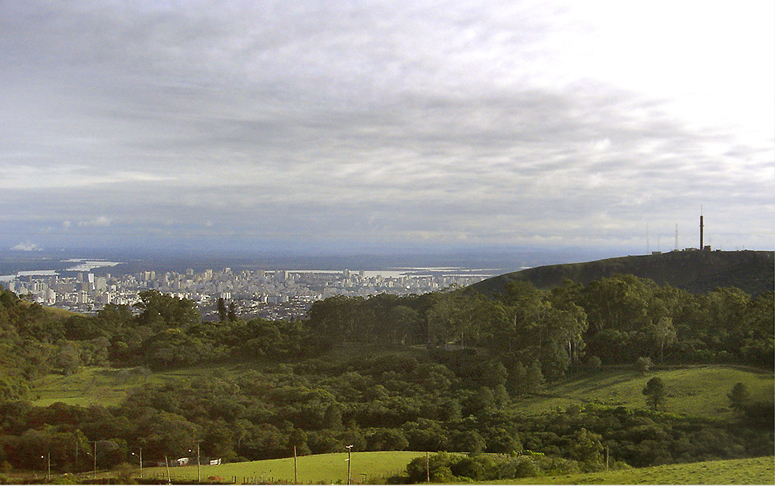 Porto Alegre, Brasil, vista de cima do Morro da Glória (ou da Polícia).